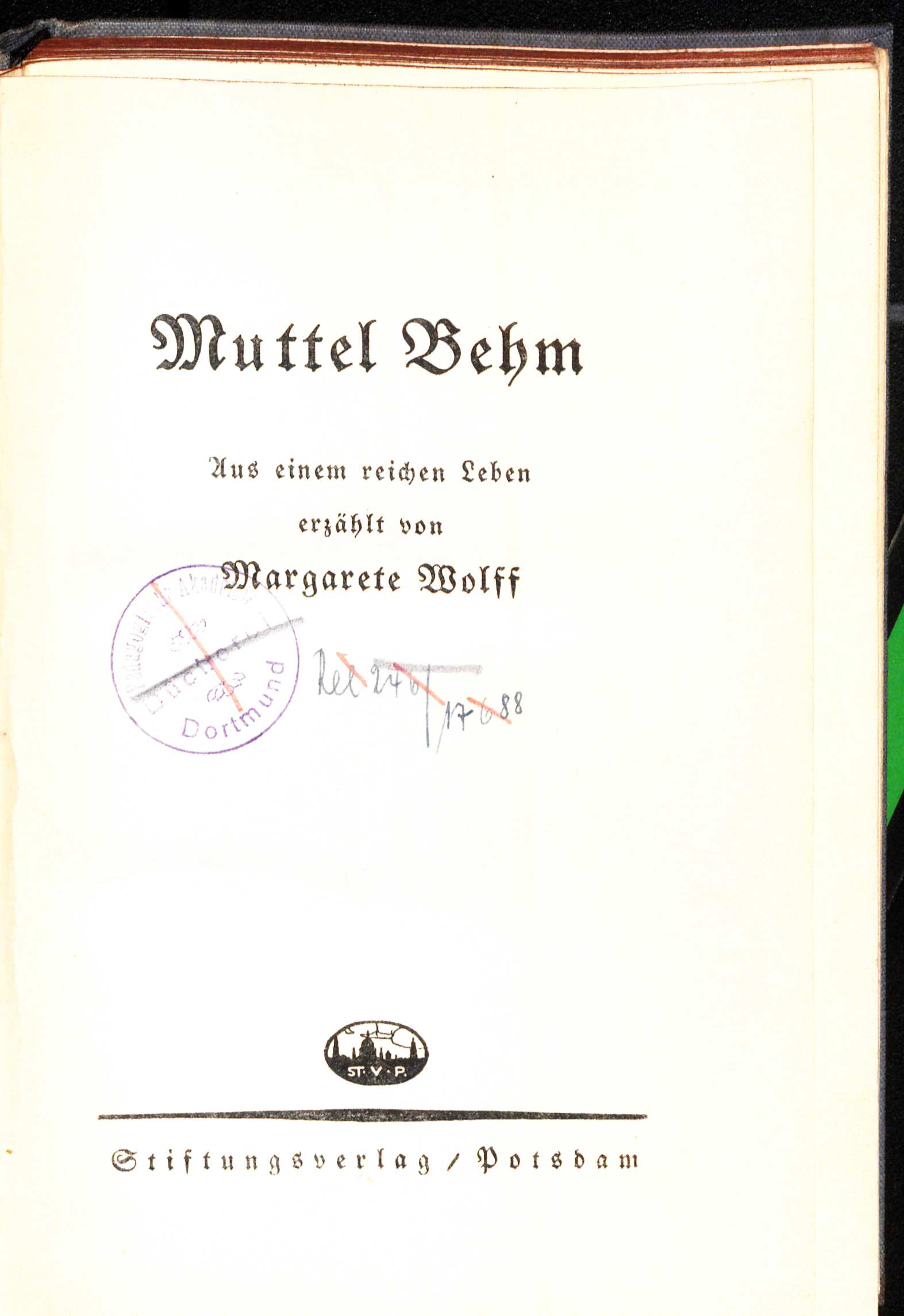 Margarete Wolff: Muttel Behm : Aus einem reichen Leben. Potsdam : Stiftungsverlag, 1930